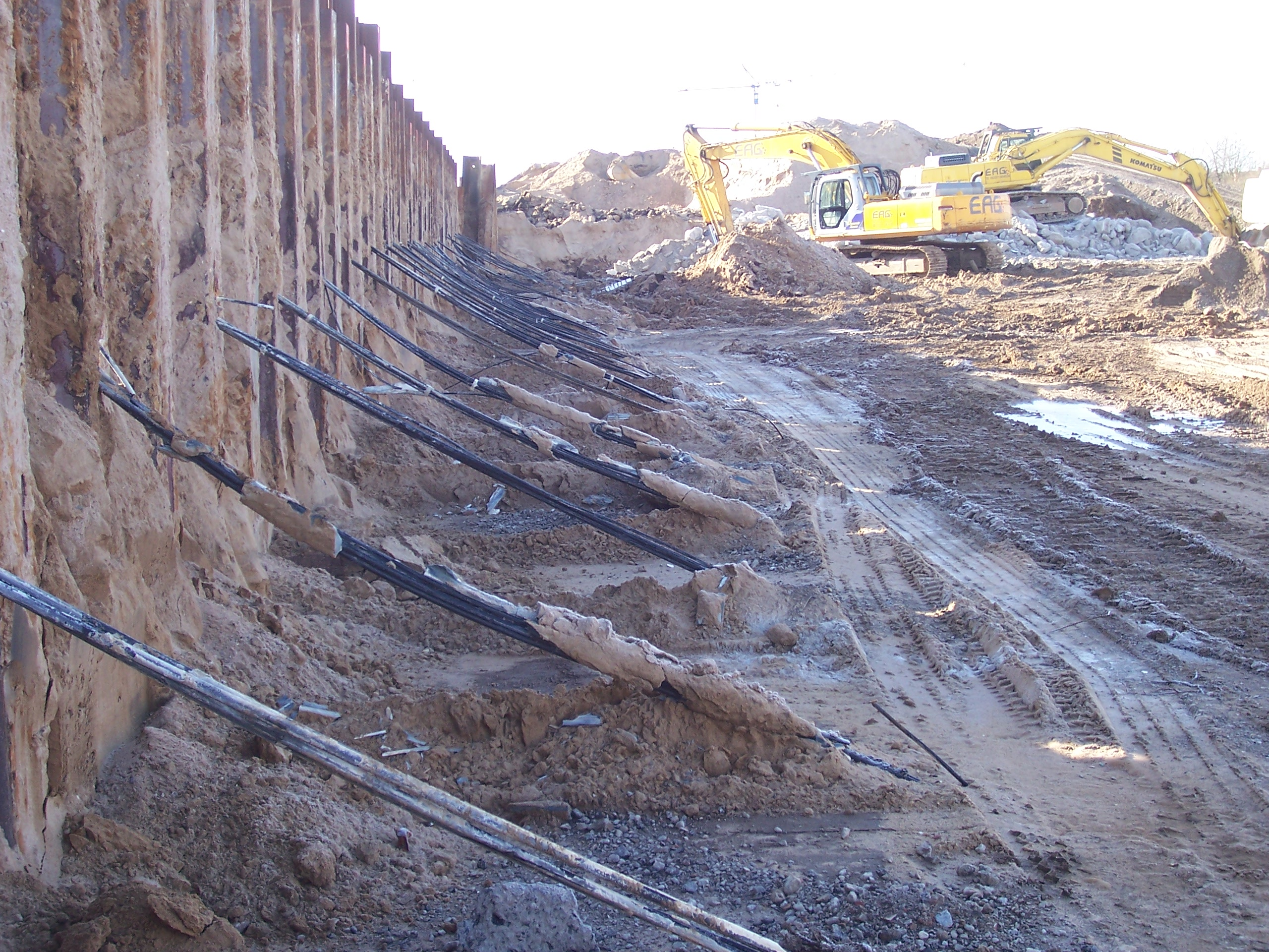 Die Rückseite eine Spundwand mit inzwischen ausgegrabenen Injektionsankern zur Rückverankerung.